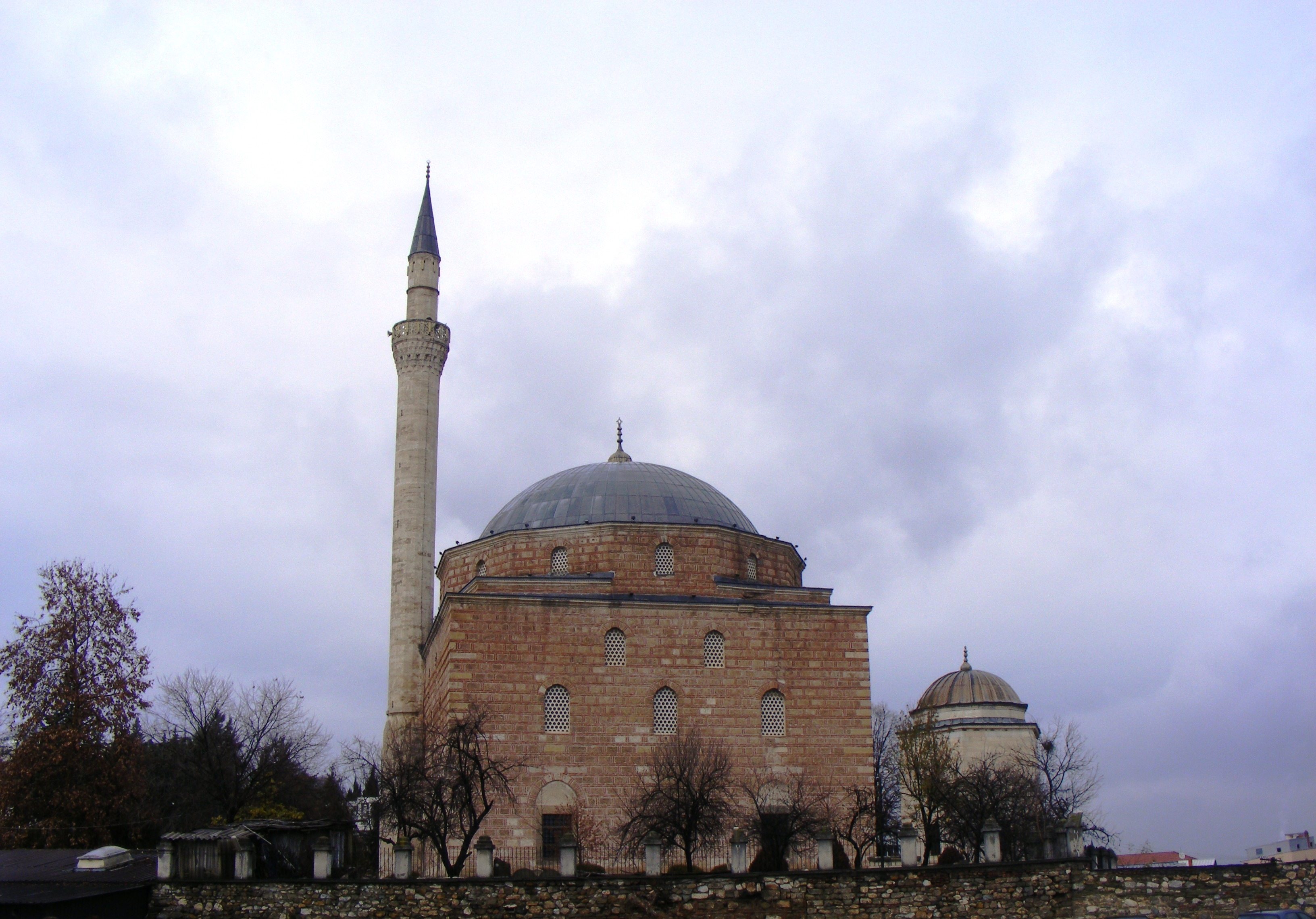 Xhamia e Mustafa Pashasë në Shkup